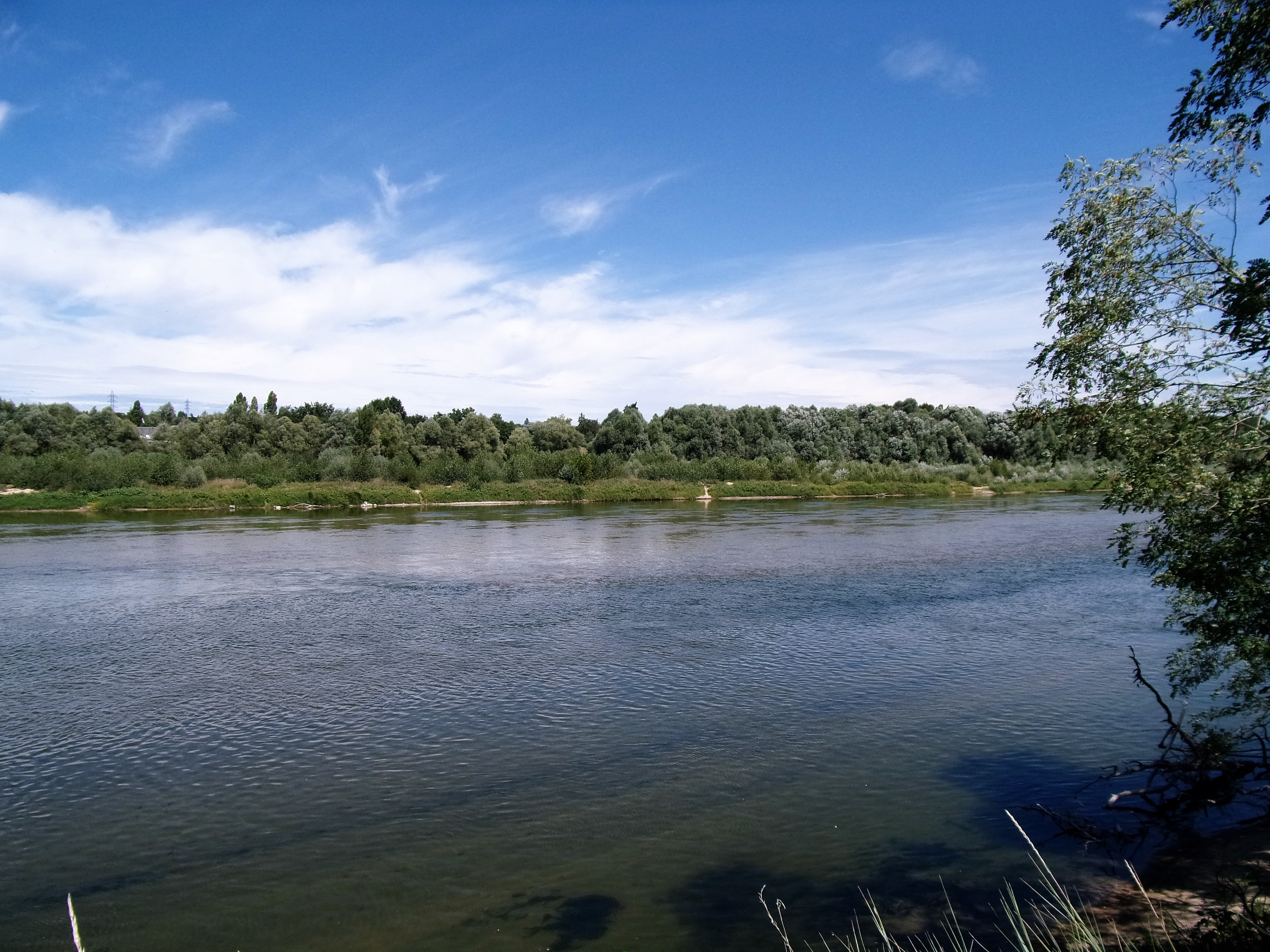 La Loire vue de le rive sud. Fondettes en arrière-plan